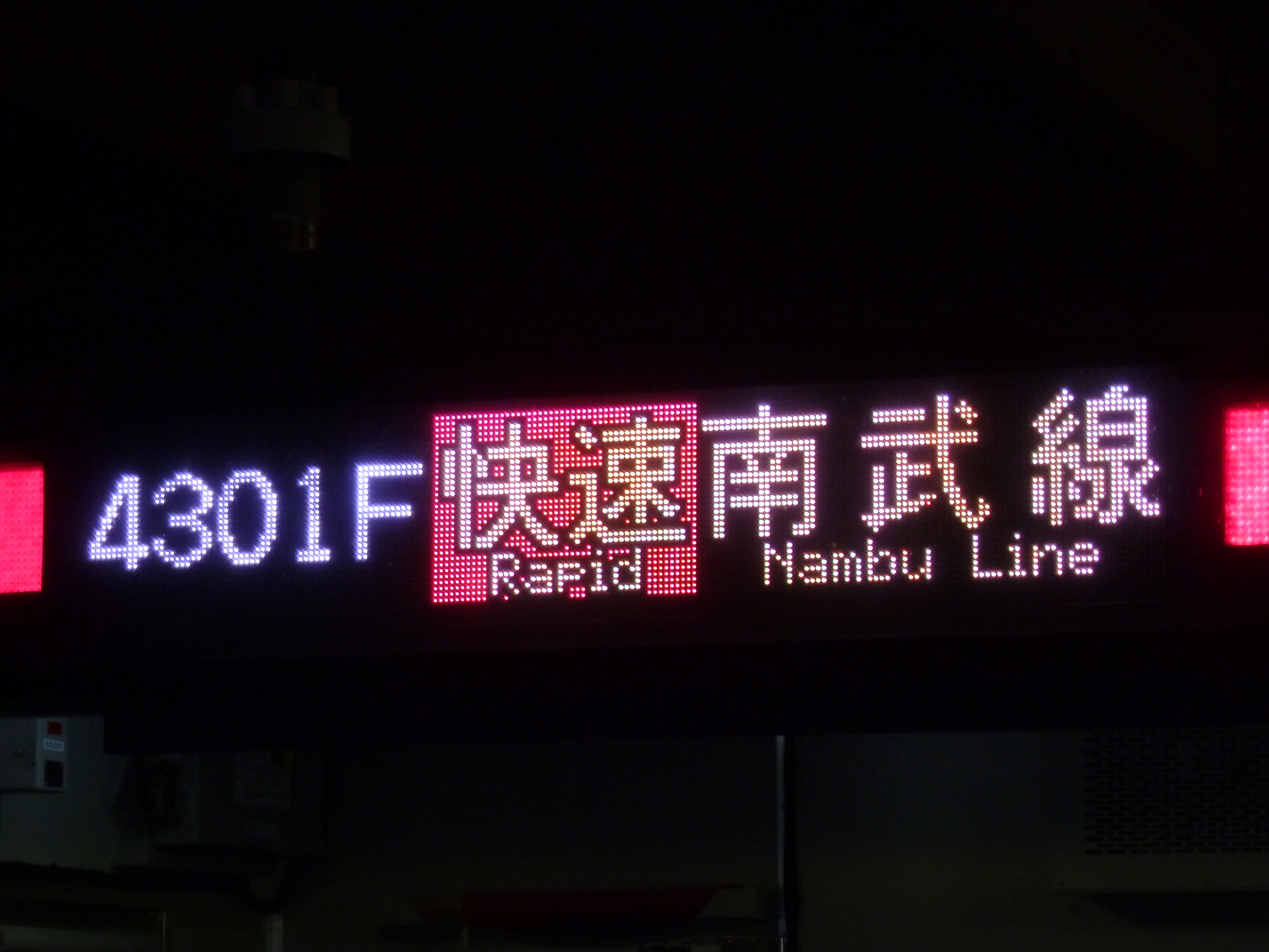 路線名の時の違い